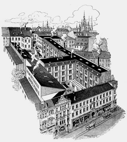 Firma Gebr. Bethmann um 1907: Gr. Steinstr. 79 u. Brüderstr. 5 (Werbezeichnung Stadtarchiv)